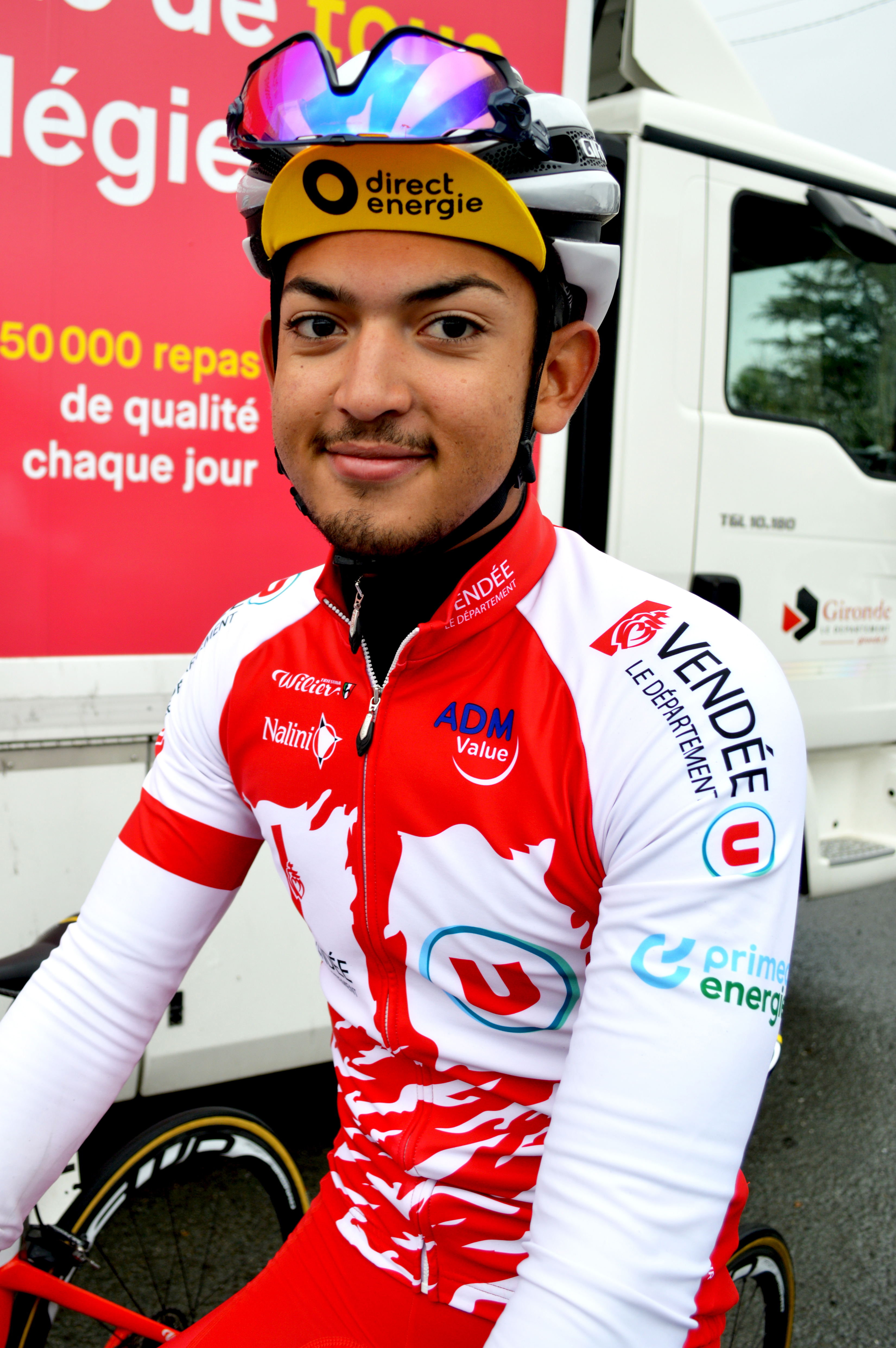 D. Grondin (mars 2019)